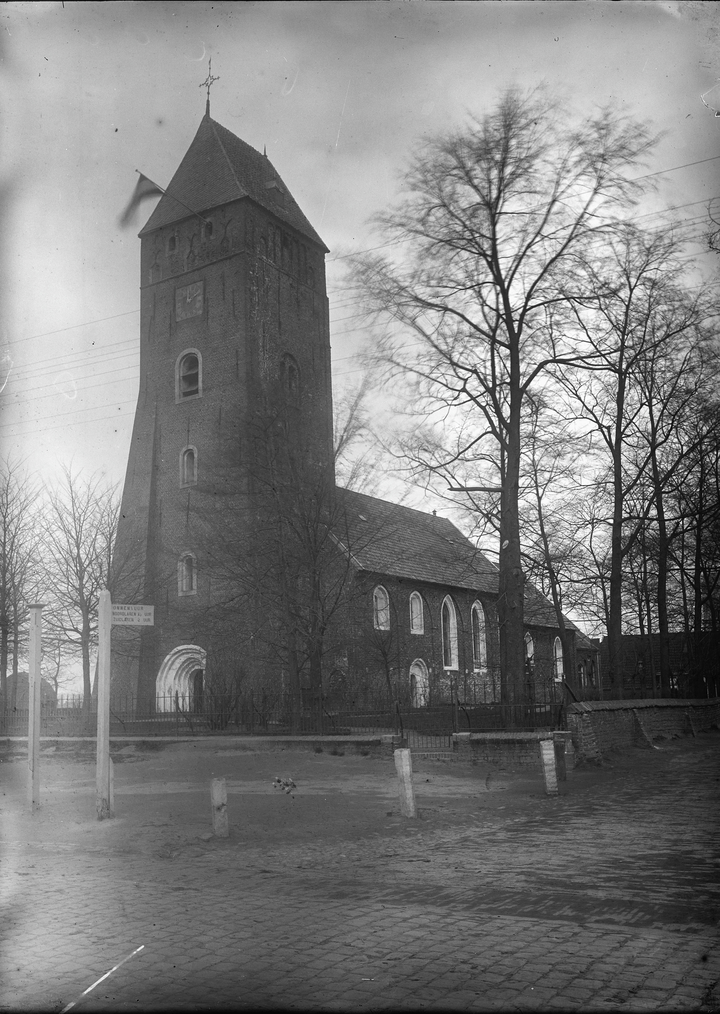 N.H.Kerk: exterieur vanuit het zuid-westen